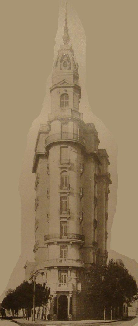 El edificio conocido como Palacio Raggio, terminado en el año 1924 y proyectado por el arquitecto Gino Aloisi para José Raggio, como propiedad de renta (alquiler). Se encuentra en la esquina de las avenidas Rivadavia e Hipólito Yrigoyen y es un emblema del barrio. Ciudad de Buenos Aires, Argentina.